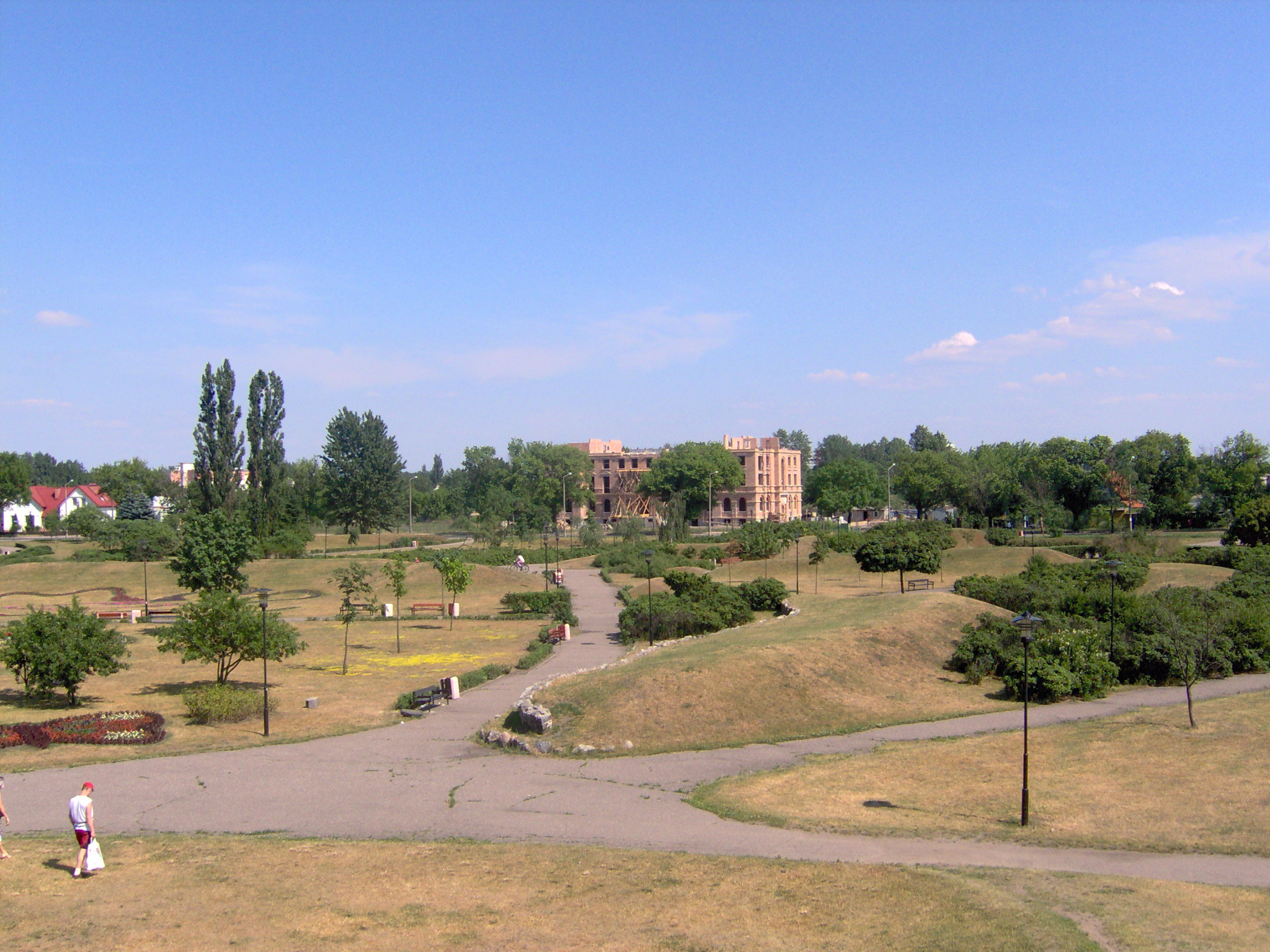 Budowa Pałacu Bursztynowego (2007 r.)